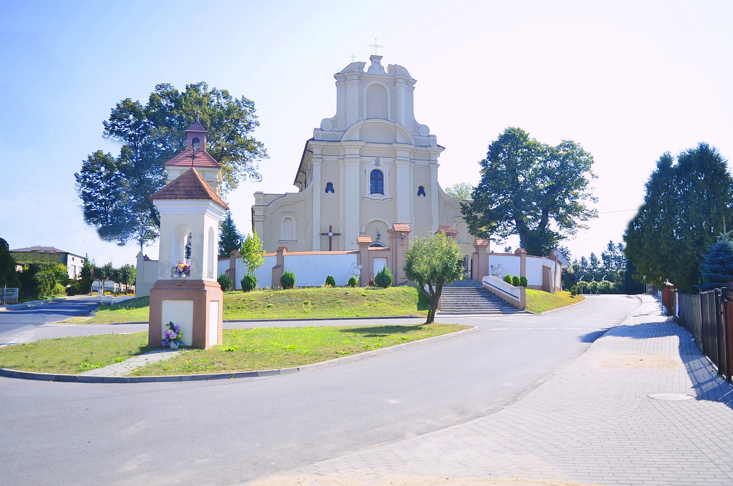 Brzeźnio, Zespół kościoła św. Idziego